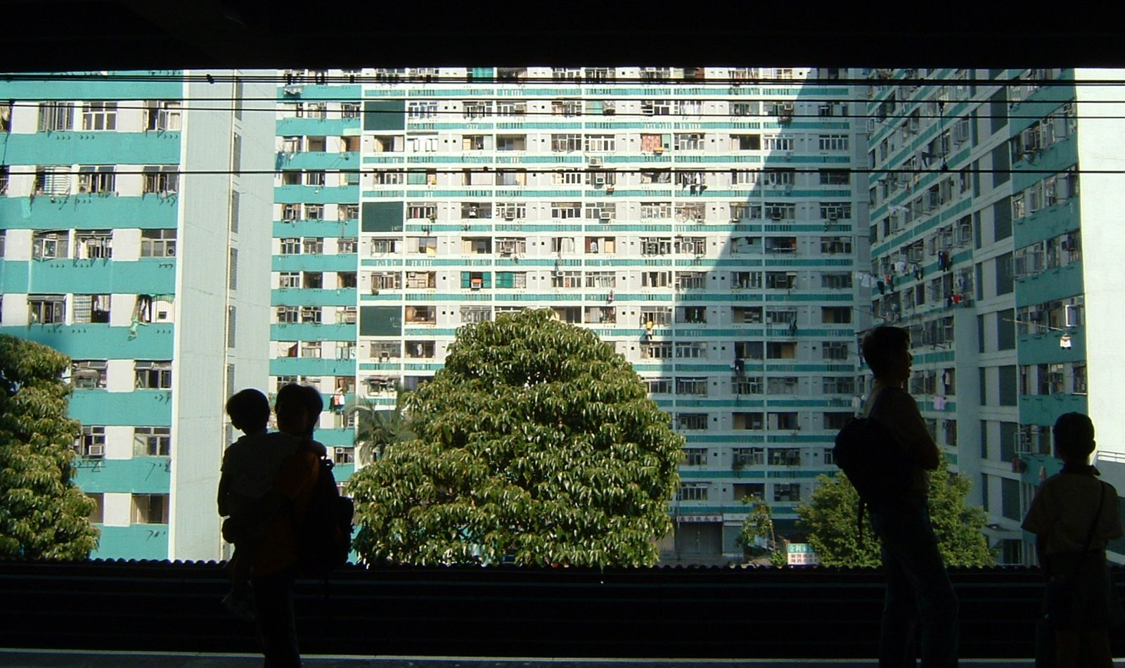 Wohnhaeuser an der MTR-Station Kowloon Bay geschossen und unter der GNU-FDL veroeffentlicht von Benutzer Herr Klugbeisser